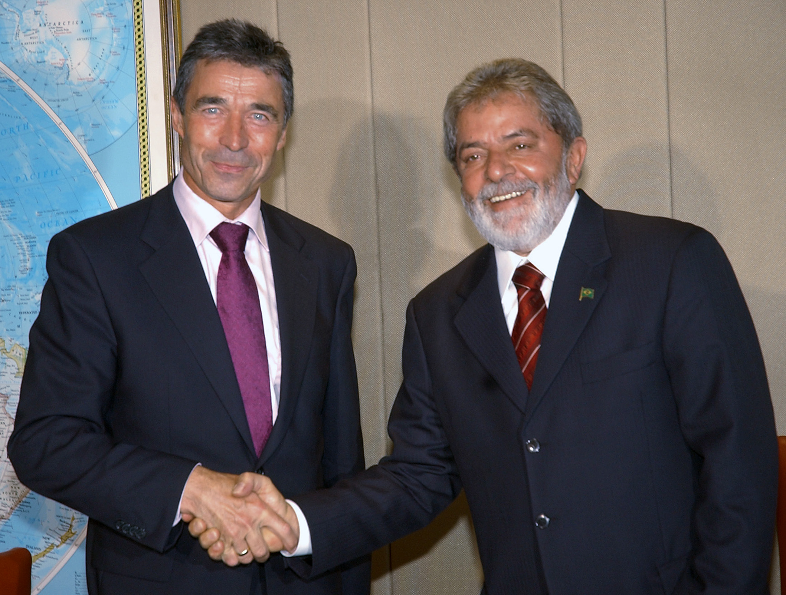 Brasília - O primeiro-ministro da Dinamarca, Anders Fogh Rasmussen, durante encontro com o presidente Lula.